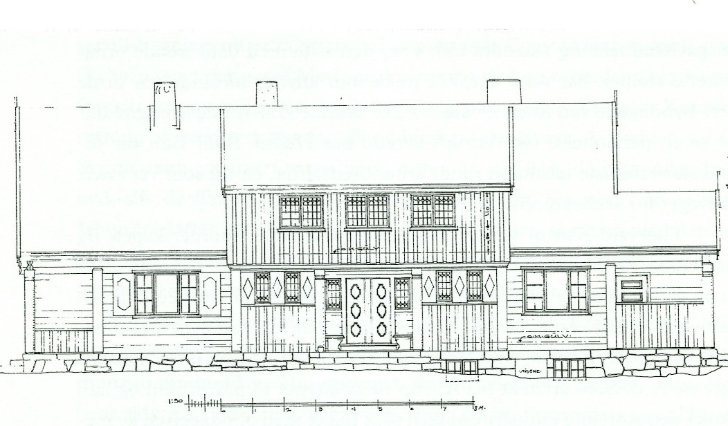 Lysebu-Skogstuen-Thorvald Astrups plan 1918